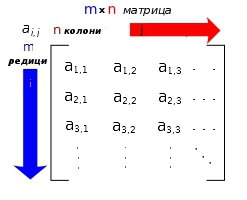 Matrix